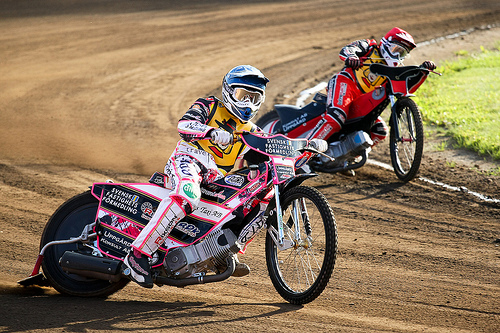 Bild på Anton Rosén i röd hjälm närmast kameran